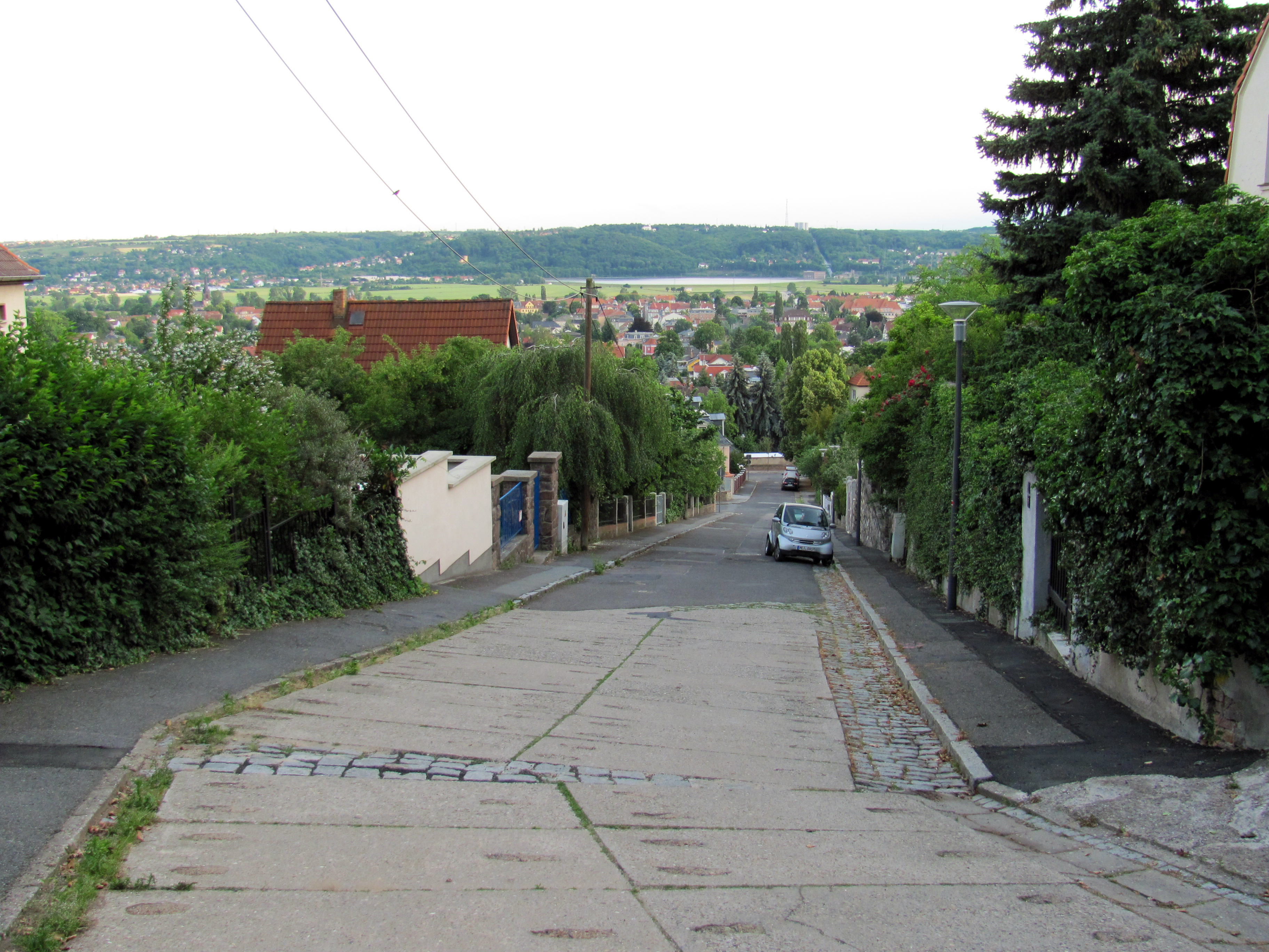 Radebeul, Burgstraße etwas oberhalb des Wasserreservoirs